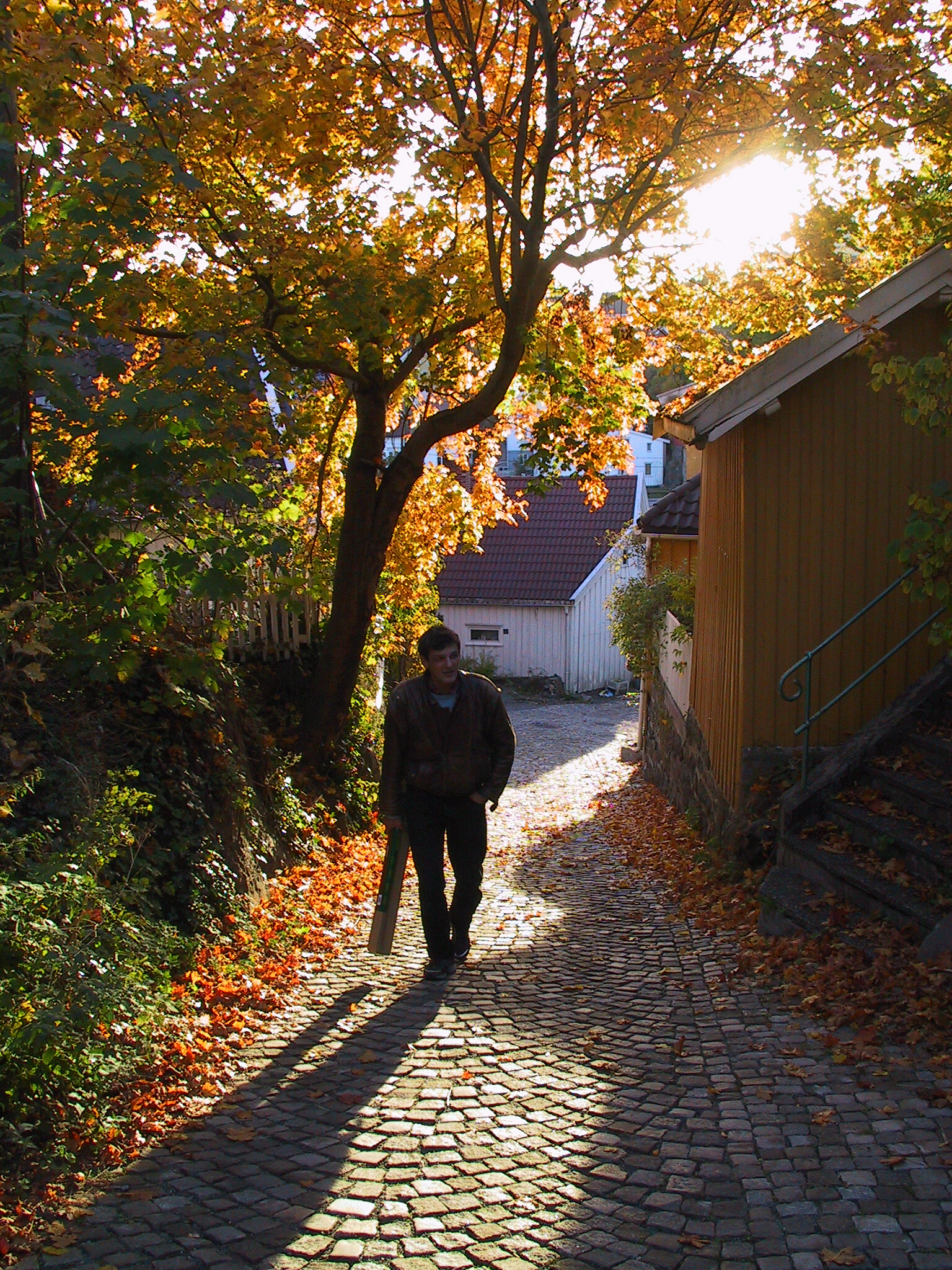 Hulveien i Arendal